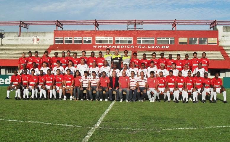 Delegação do América, campeão da Série B do Rio de Janeiro em 2009. Foto de Carlos Silva.